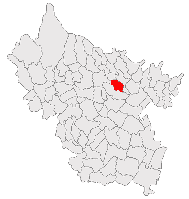 Categorie:Hărţi ale judeţului Buzău